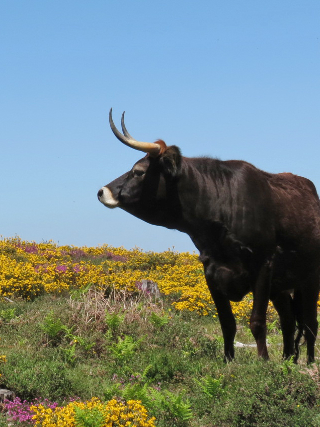 A vaca maronesa é caraterística do Alvão. This is a photography of a Site of Community Importance in Portugal with the ID: PTCON0003. Natura2000 entry, EEA entry